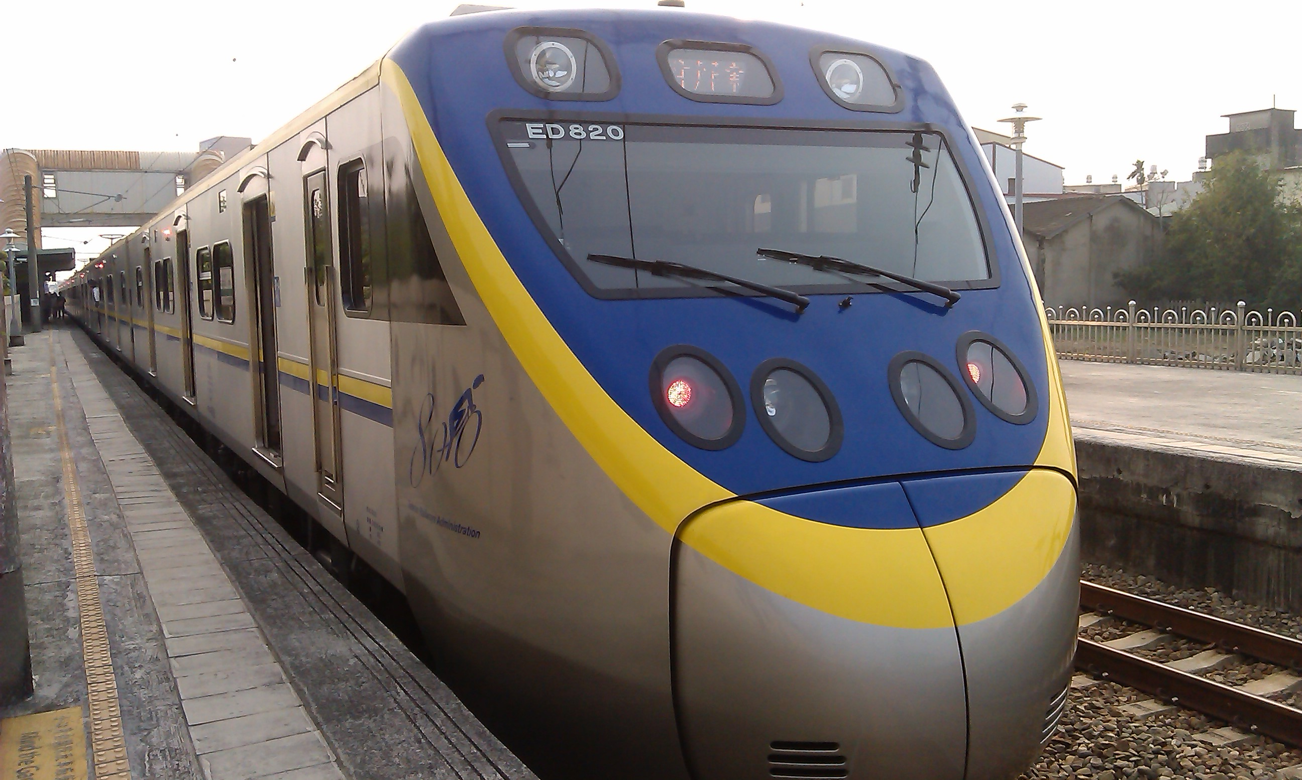 中文（台灣）: 臺灣鐵路管理局EMU800型電聯車EMU820，停靠水上車站。